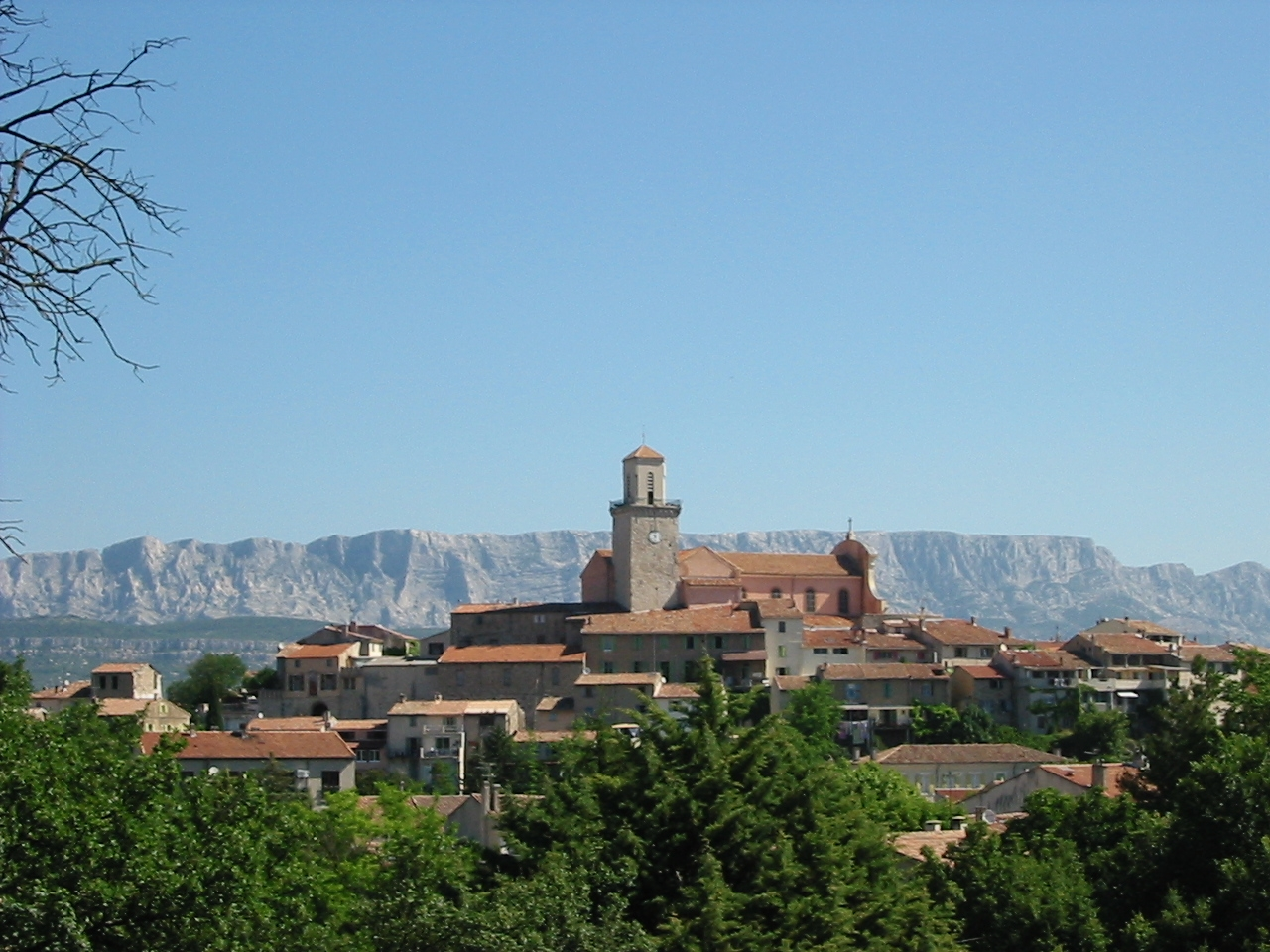 Vue de Fuveau avec la montagne Sainte-Victoire à l'horizon.